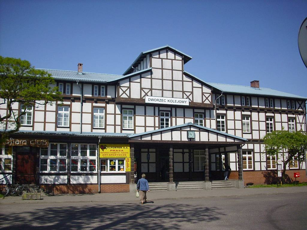 Białogard. Dworzec kolejowy, widok od ulicy.